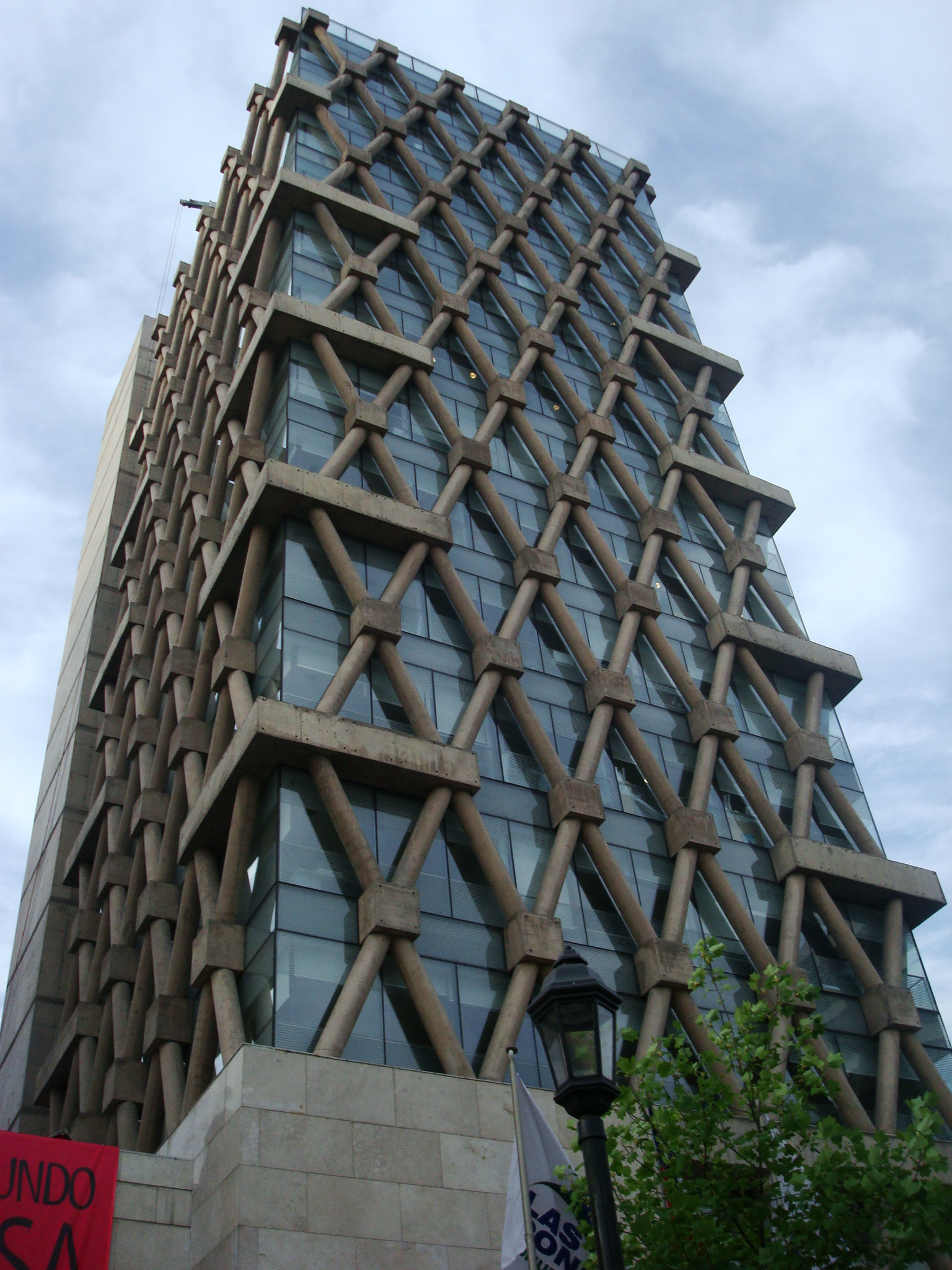 Edificio de la Municipalidad de Las Condes, Santiago de Chile.